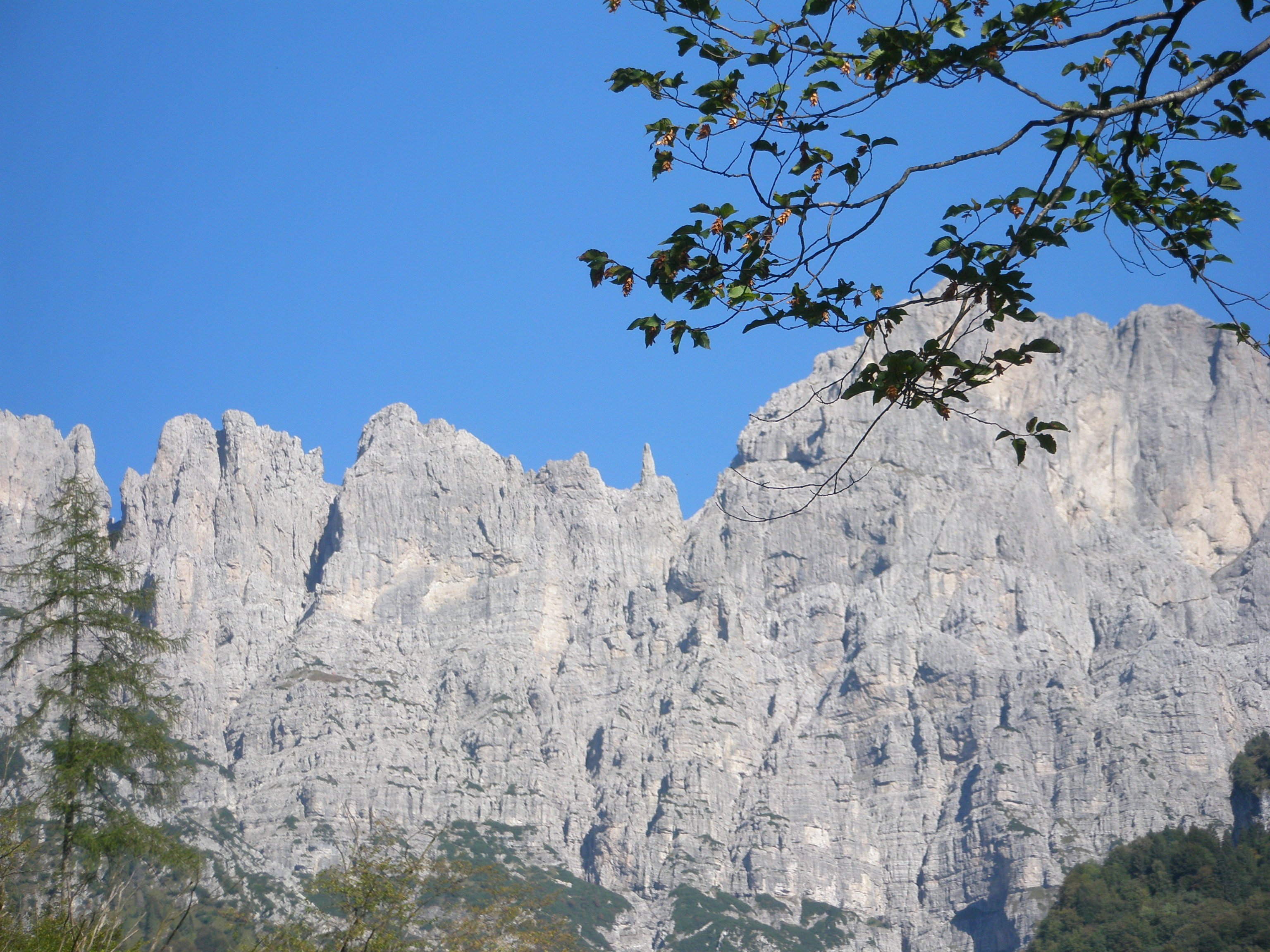 La Gusela del Vescovà vista da sud